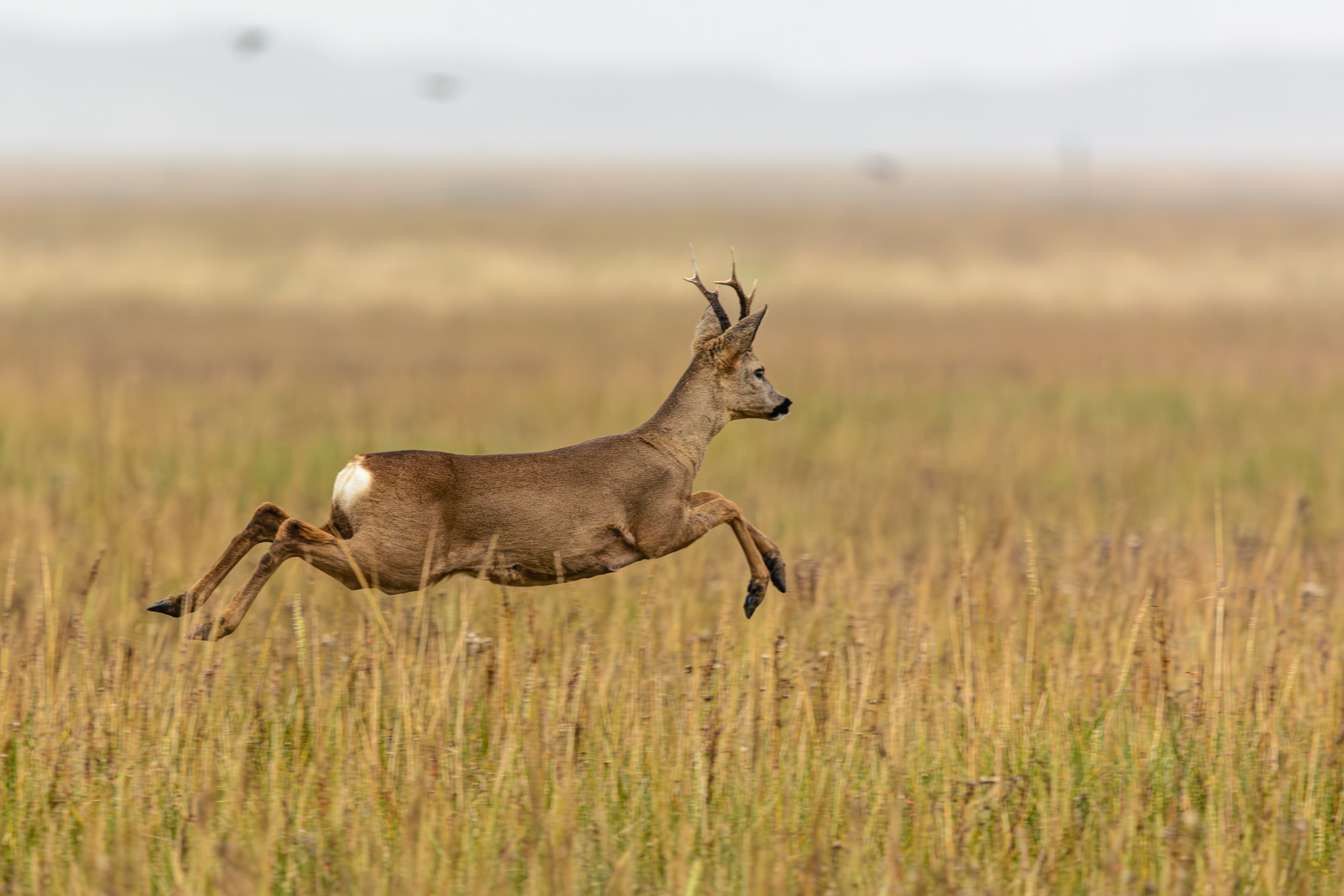 flüchtender Rehbock auf der Ostplate Spiekeroog - Nationalpark niedersächsisches Wattenmeer